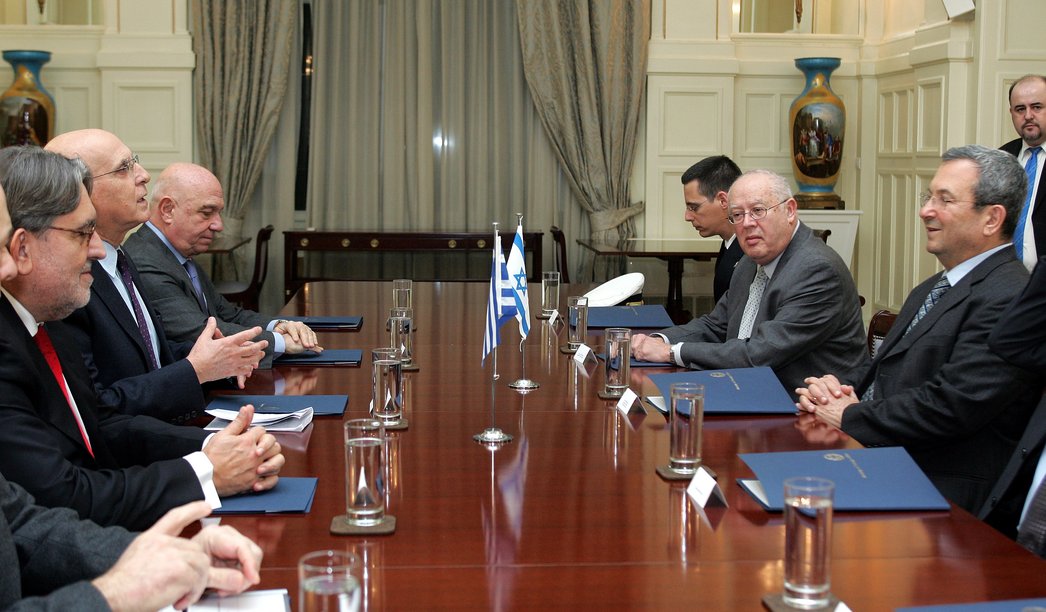 Στις 11 Ιανουαρίου 2012 ο Υπουργός Εξωτερικών Σταύρος Δήμας συναντήθηκε με τον Αντιπρόεδρο και Υπουργό Άμυνας του Ισραήλ Ehud Barak.